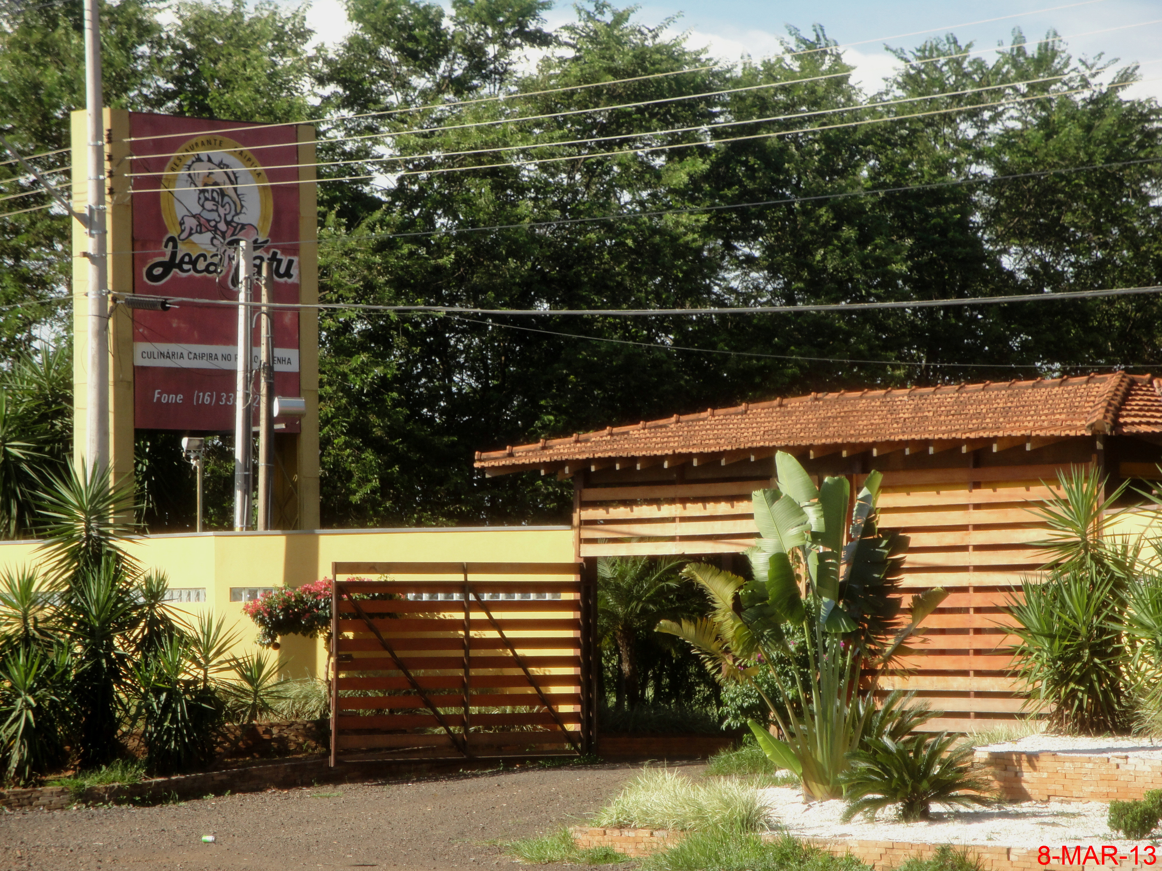 Restaurante Jeca Tatu na Rodovia Araraquara-Bueno de Andrada-Matão (Rodovia da Coxinha)